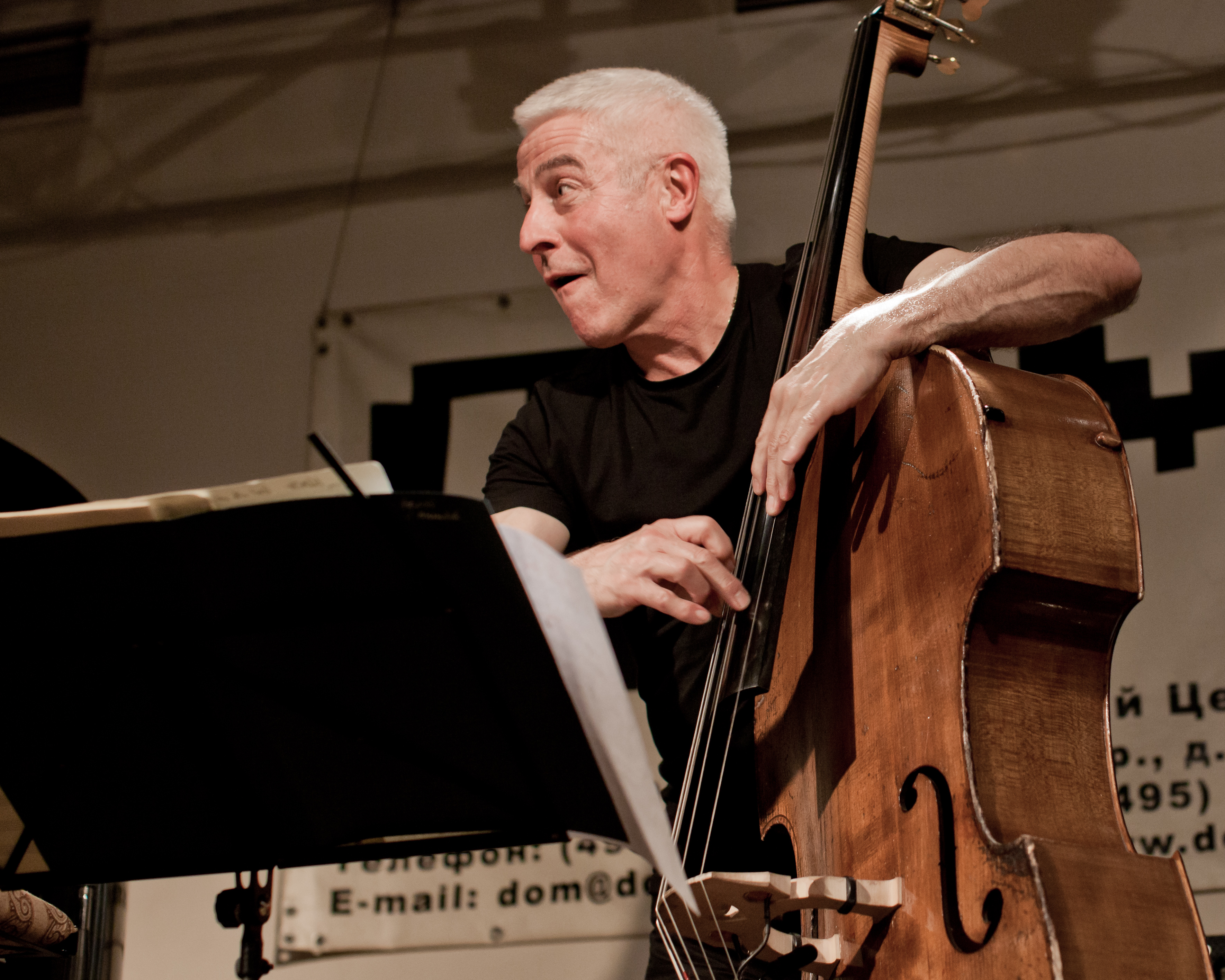 Aurora Trio (Barry Guy, Agustí Fernández, Ramon Lopez) in Moscow